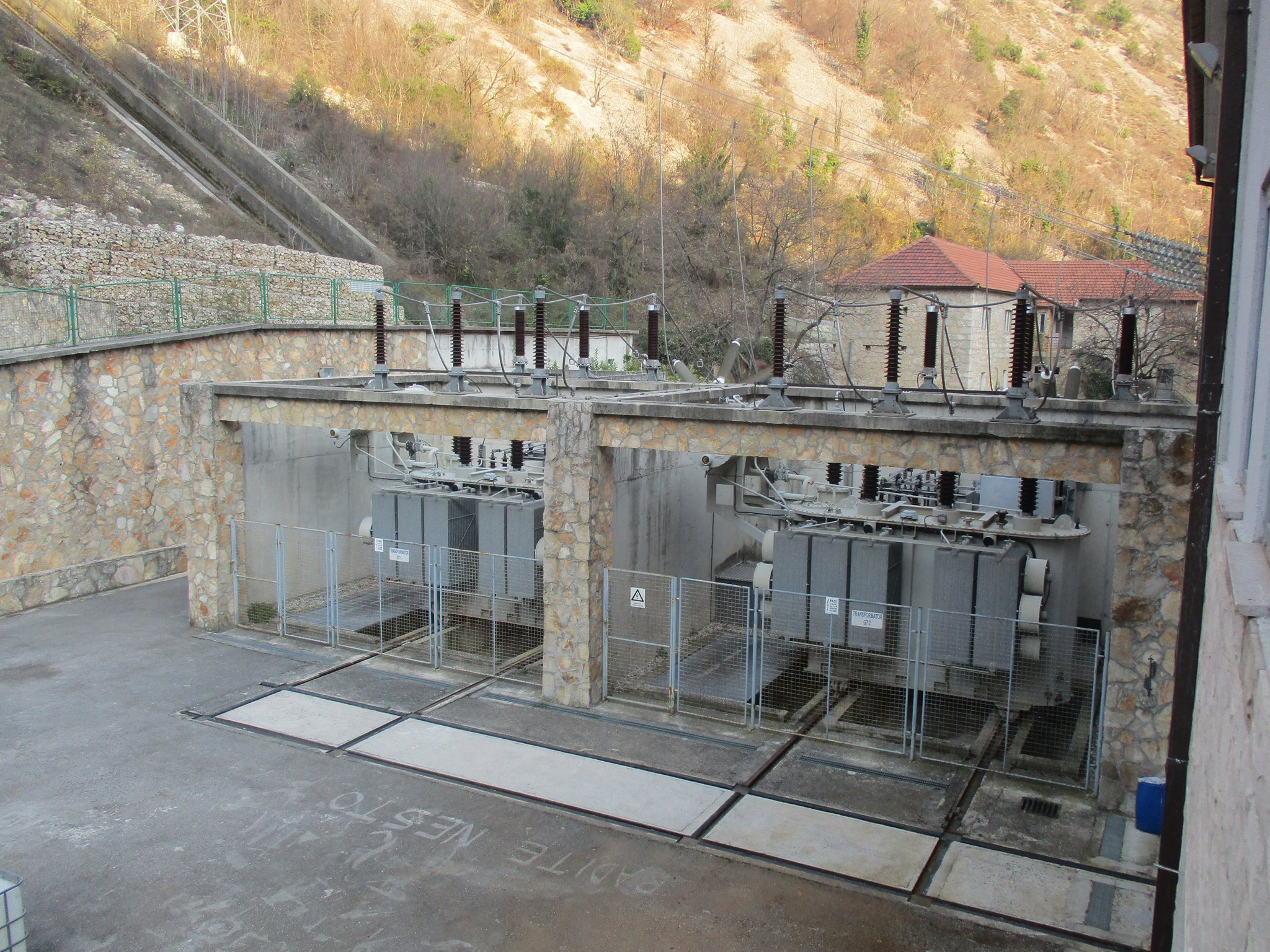 Dva transformatora po 18MVA